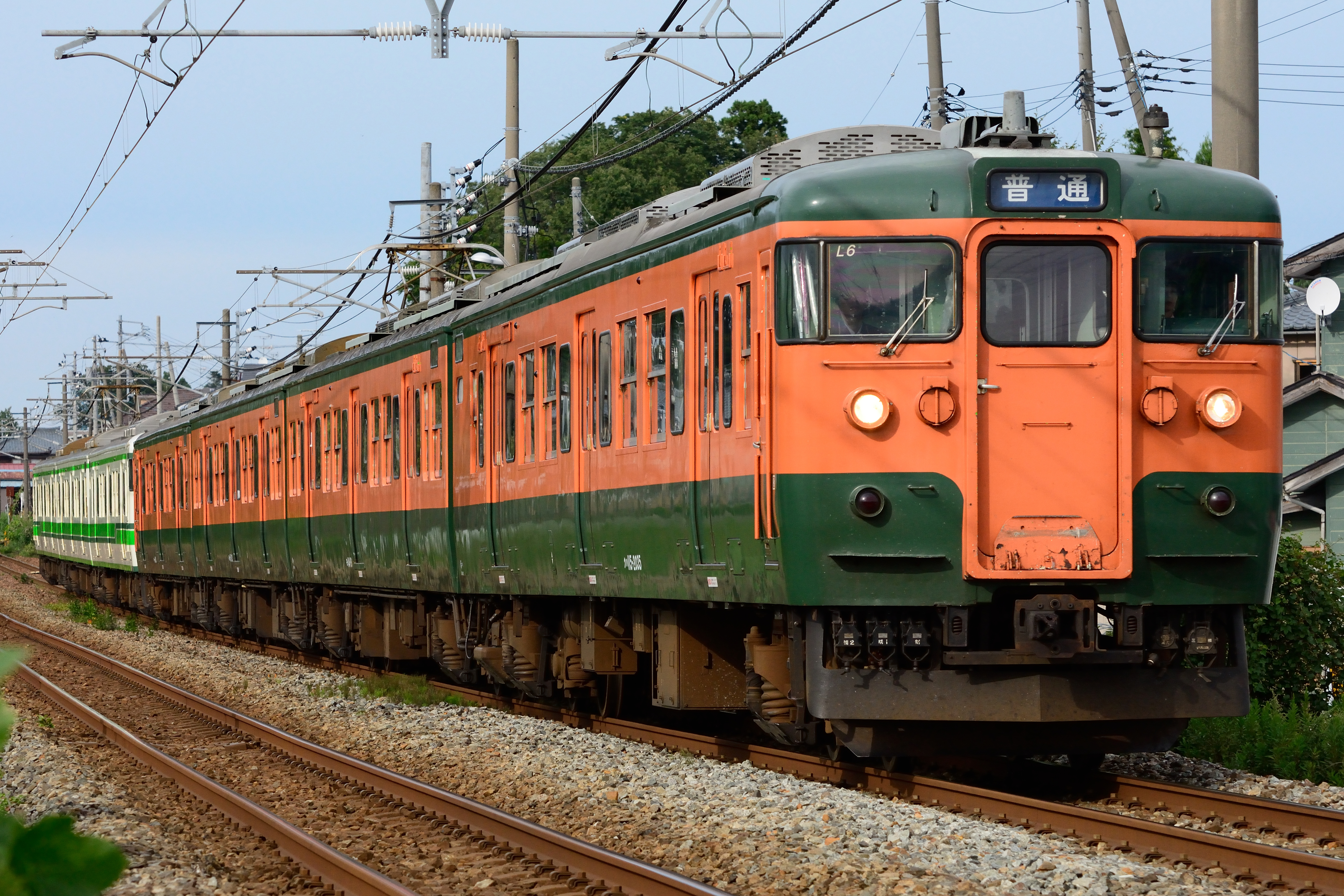 信越線（新津ー古津間）